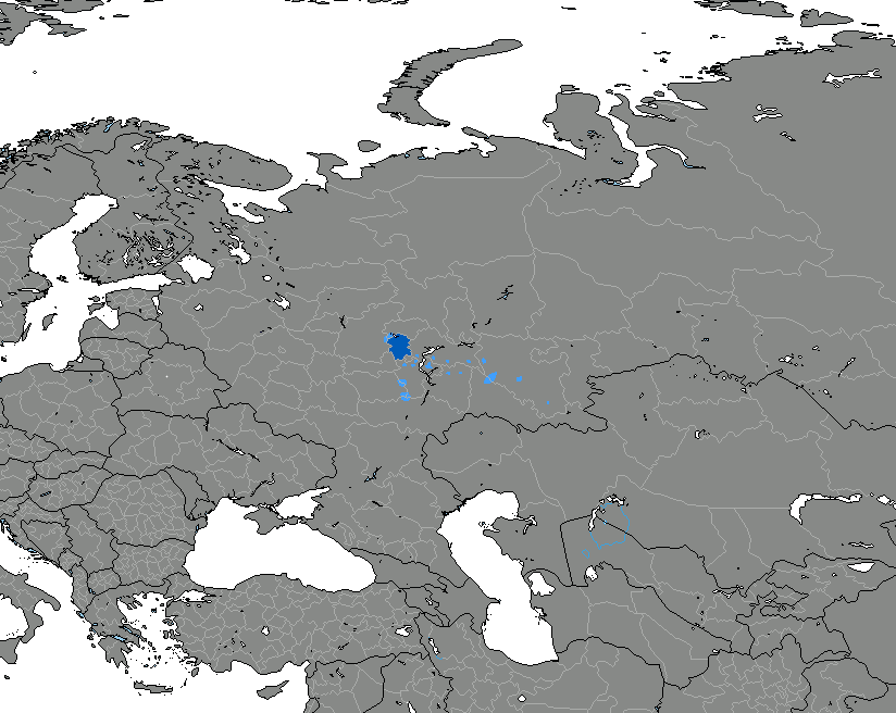 ídioma chuvasio.